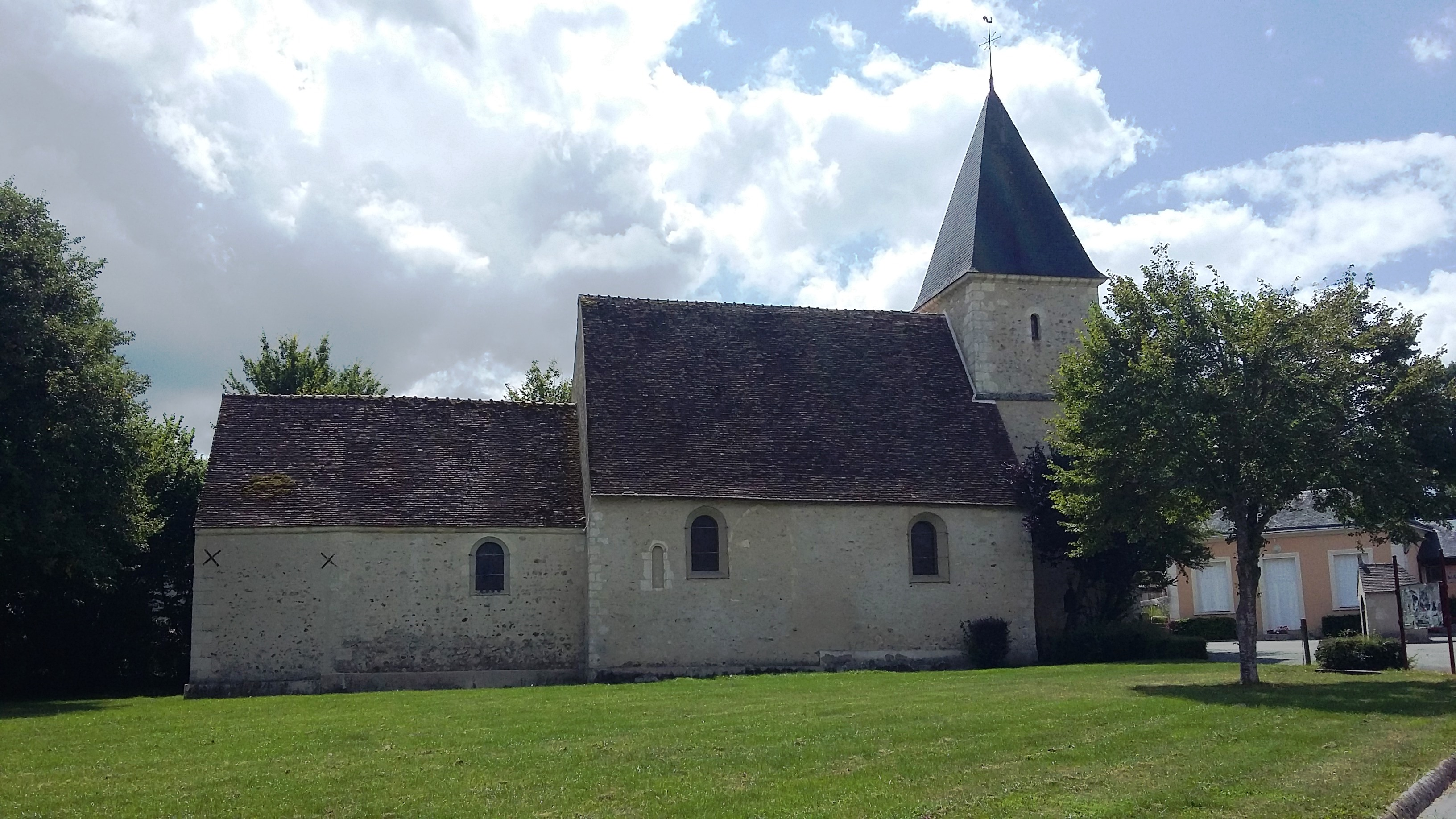 Saint-Jean-Pierre-Fixte - Église Saint-Jean-Baptiste